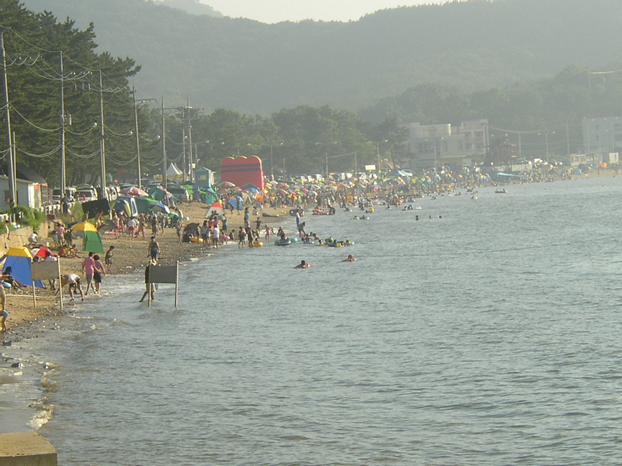 옹진군 영흥면 영흥도 장경리 해수욕장